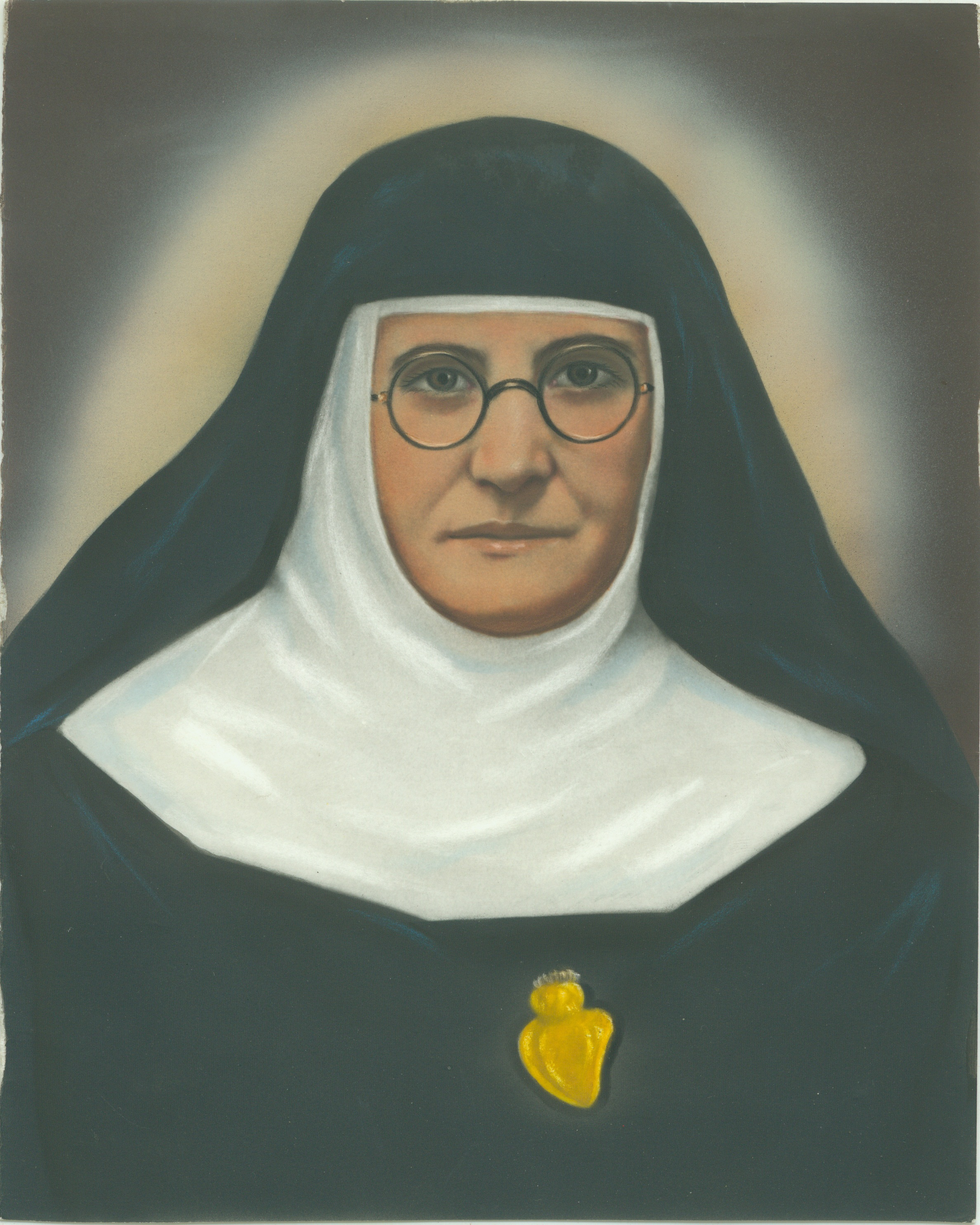 Imagen de Madre Trinidad tratada digitalmente